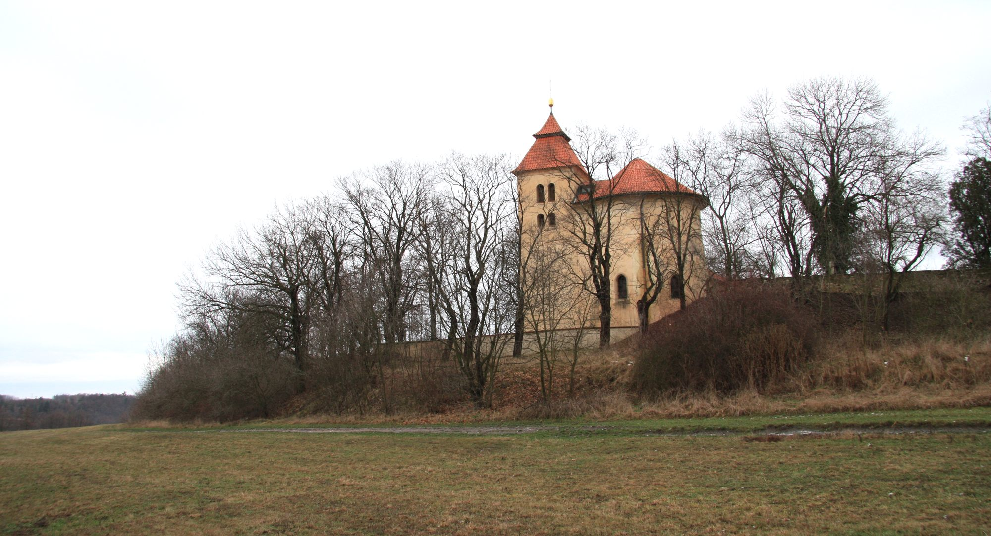 273 28 Zákolany, Czech Republic